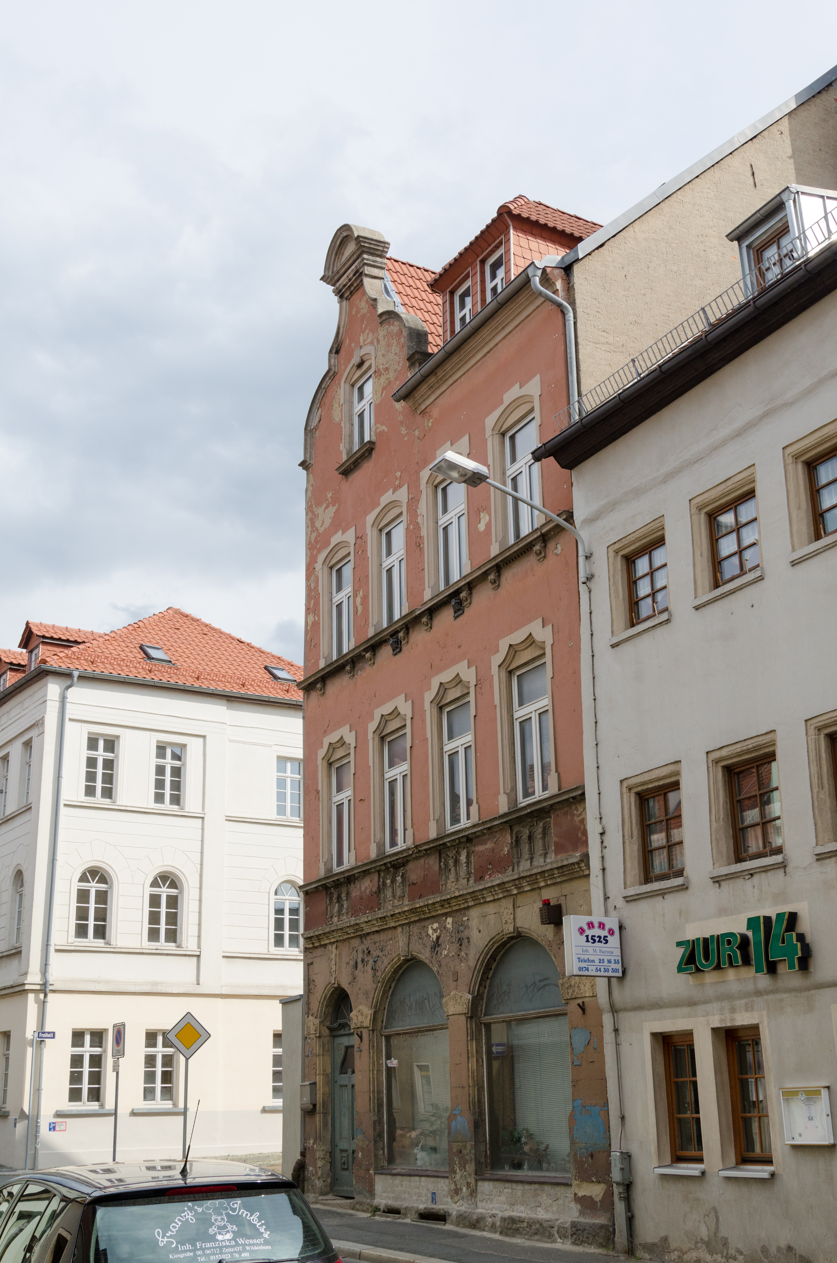 Zeitz, Kalkstraße 15